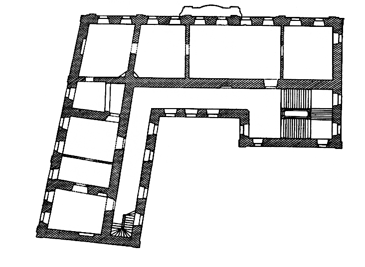 Zvíkovec – půdorys zámku podle Antonína Podlahy (zveřejněno v: Soupis památek historických a uměleckých v Království českém. IX. Politický okres Rokycanský)